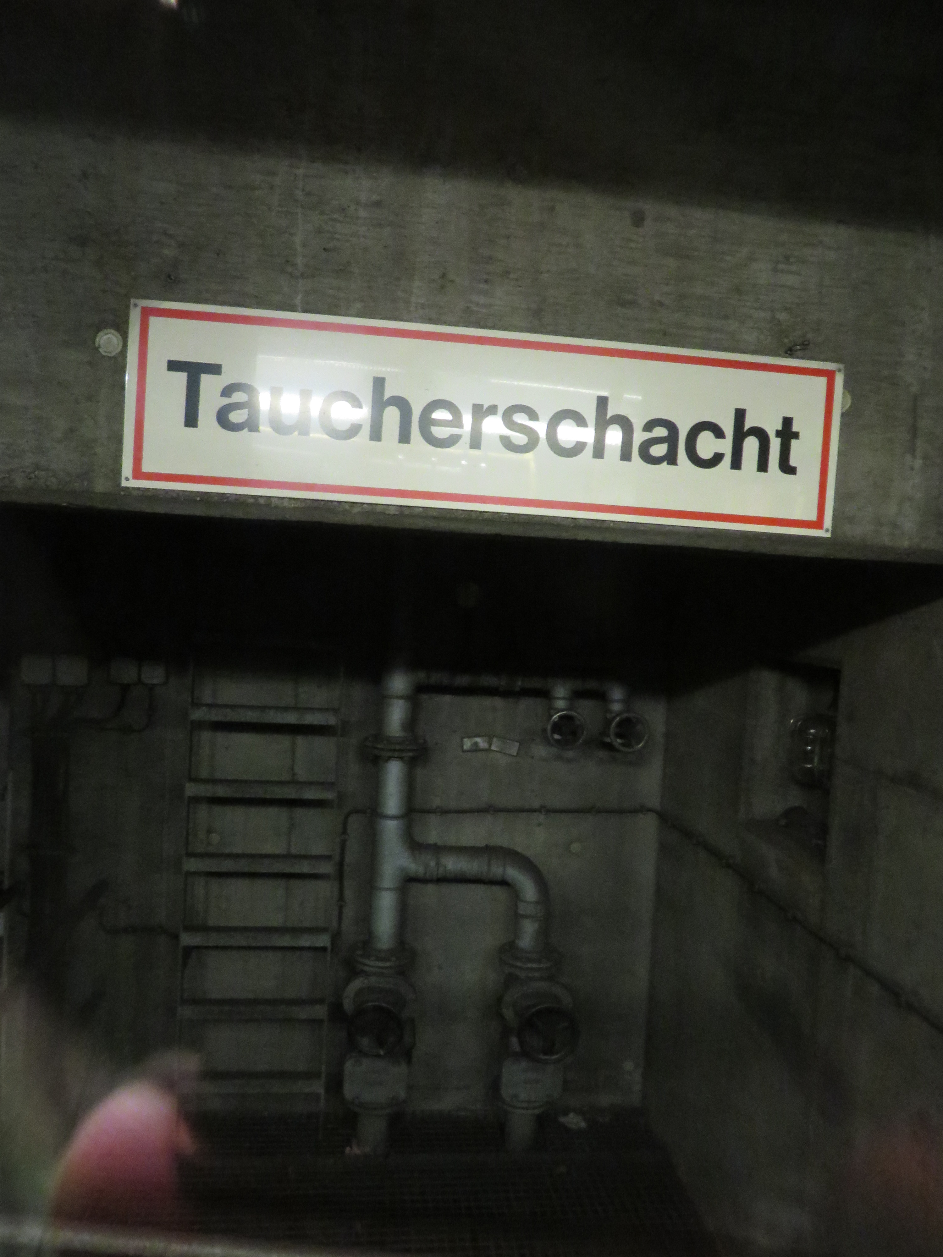 1. Bild von dieser Einrichtung im Tunnel der A-Strecke der U-Bahn Frankfurt am Main. Hier sieht man etwas mehr als auf dem nächsten Foto von derselben Stelle. Fotografiert aus einem Zug bei einem unplanmäßigem Halt auf freier Strecke